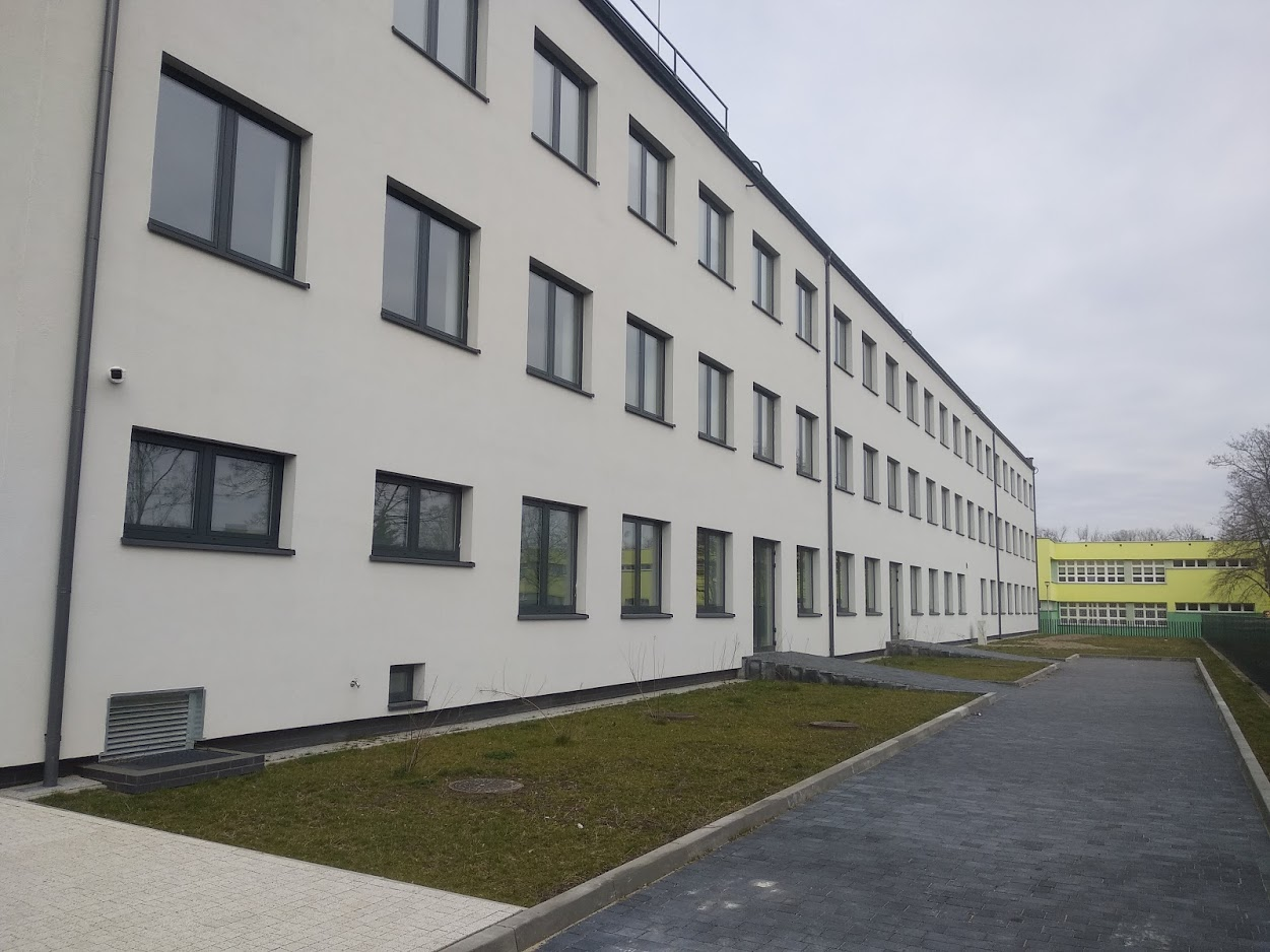 Centrum Nauk Technicznych i Nowoczesnych Technologii Państwowej Uczelni Zawodowej (ul. Energetyków, 2020 r.)